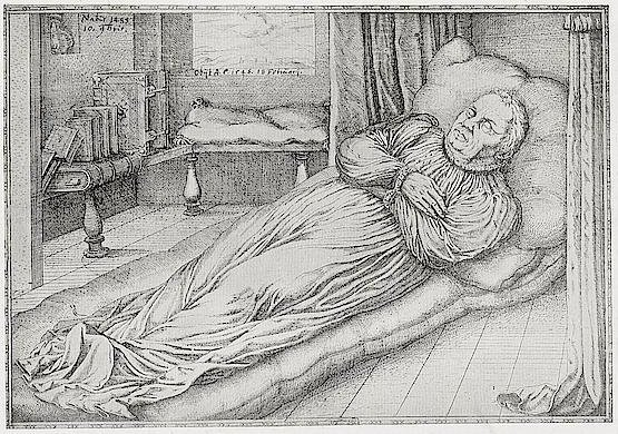 Luther auf dem Totenbett, Radierung, wohl von Jobst Amman